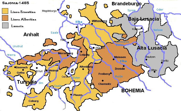 Mapa histórico de Sajonia Description: Historical map of Saxony Source: self-made Author: Luimalatesta License: Public Domain, because I want it